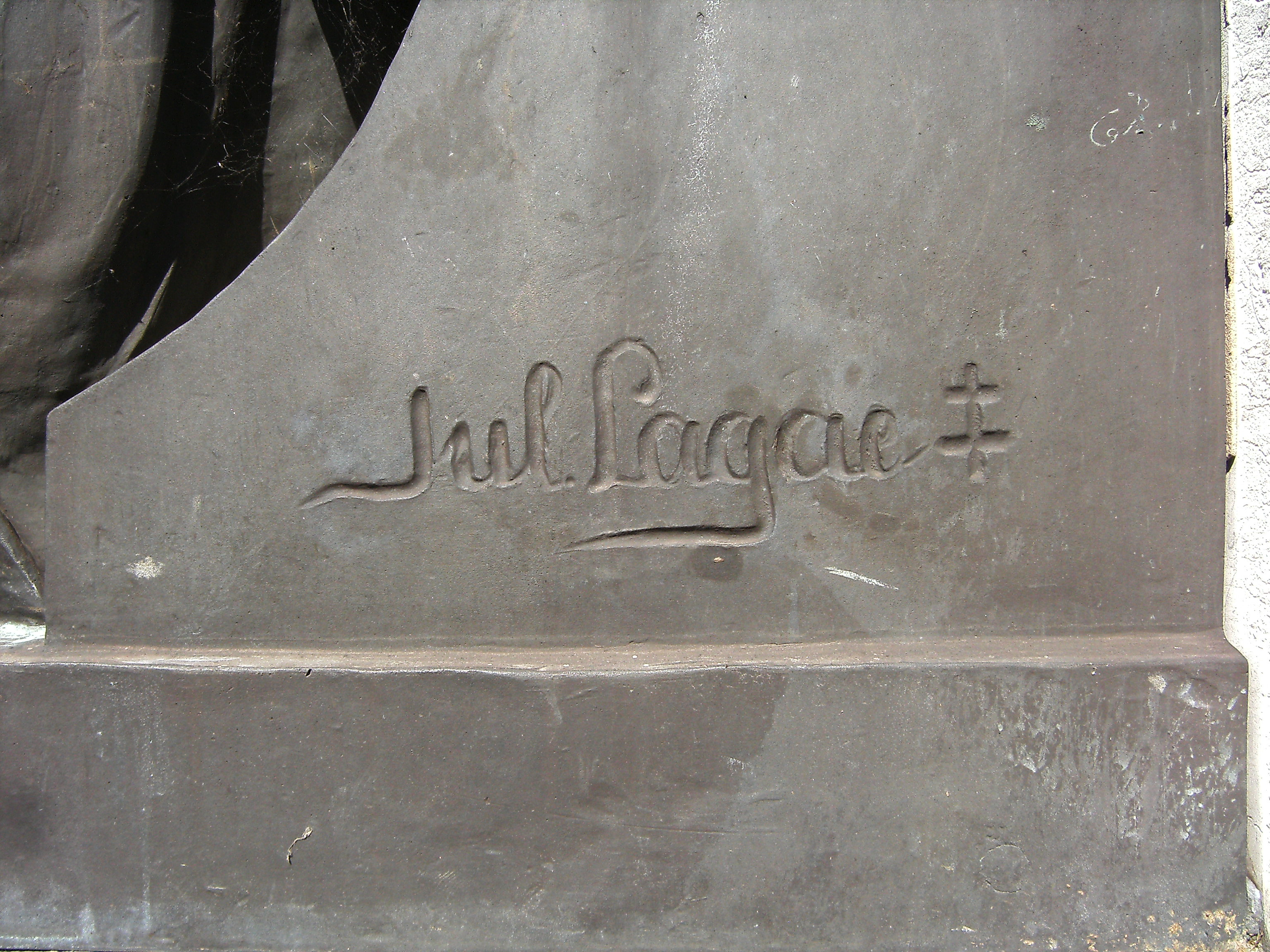 Monument "À nos martyrs 1914-1918 ; 1940-1945" Charleroi - (Belgique) - avenue de Waterloo - signature du sculpteur.l Inauguré en 1922, le monument est dû à l'architecte et bourgmestre Émile Devreux et au sculpteur Jules Lagae